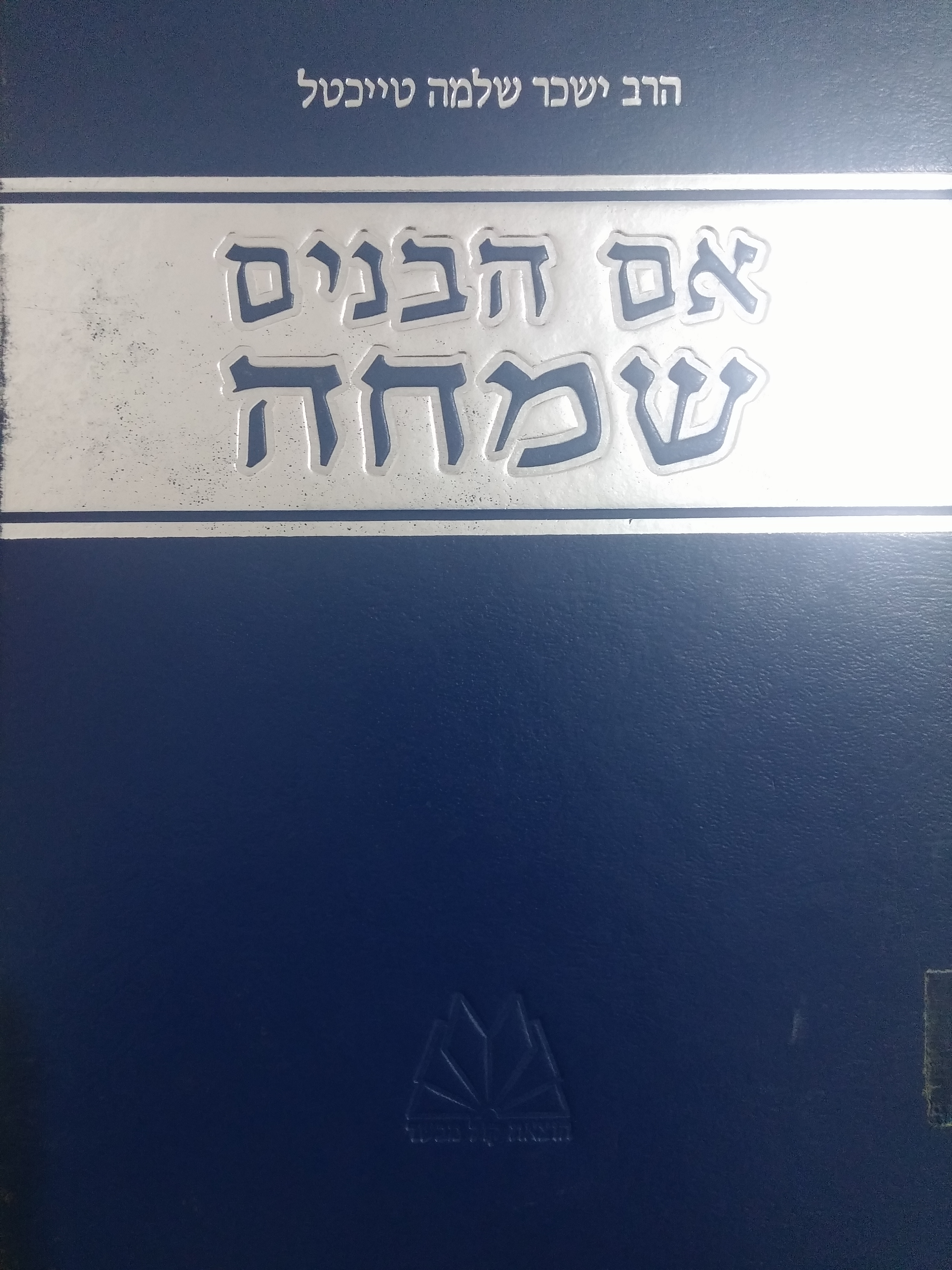 כריכת הספר בהוצאת קול מבשר